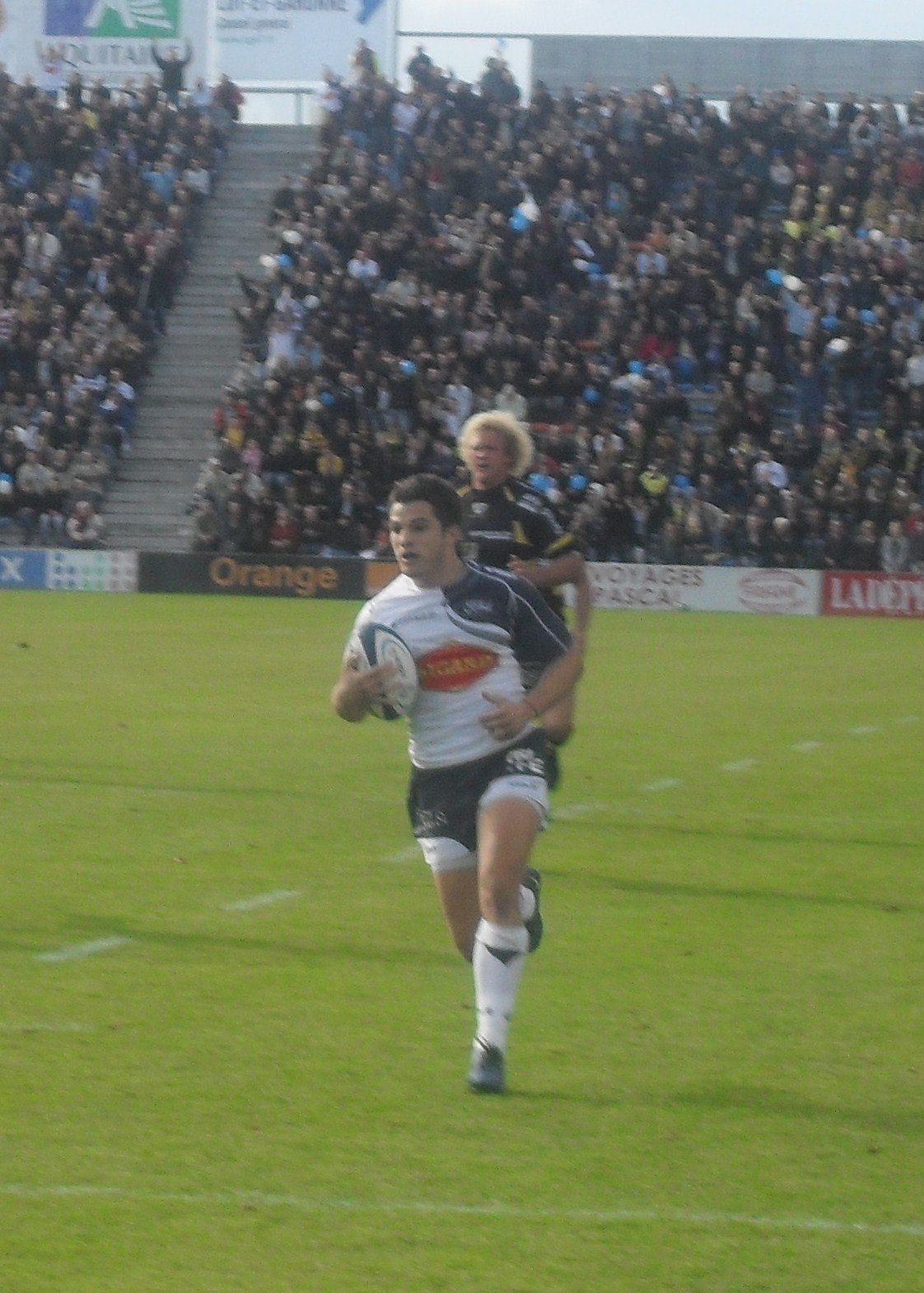 Brice Dulin arrière du SU Agen